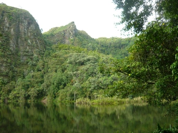 Fotografia De la laguna el tabacal La vega cundinamarca colombia